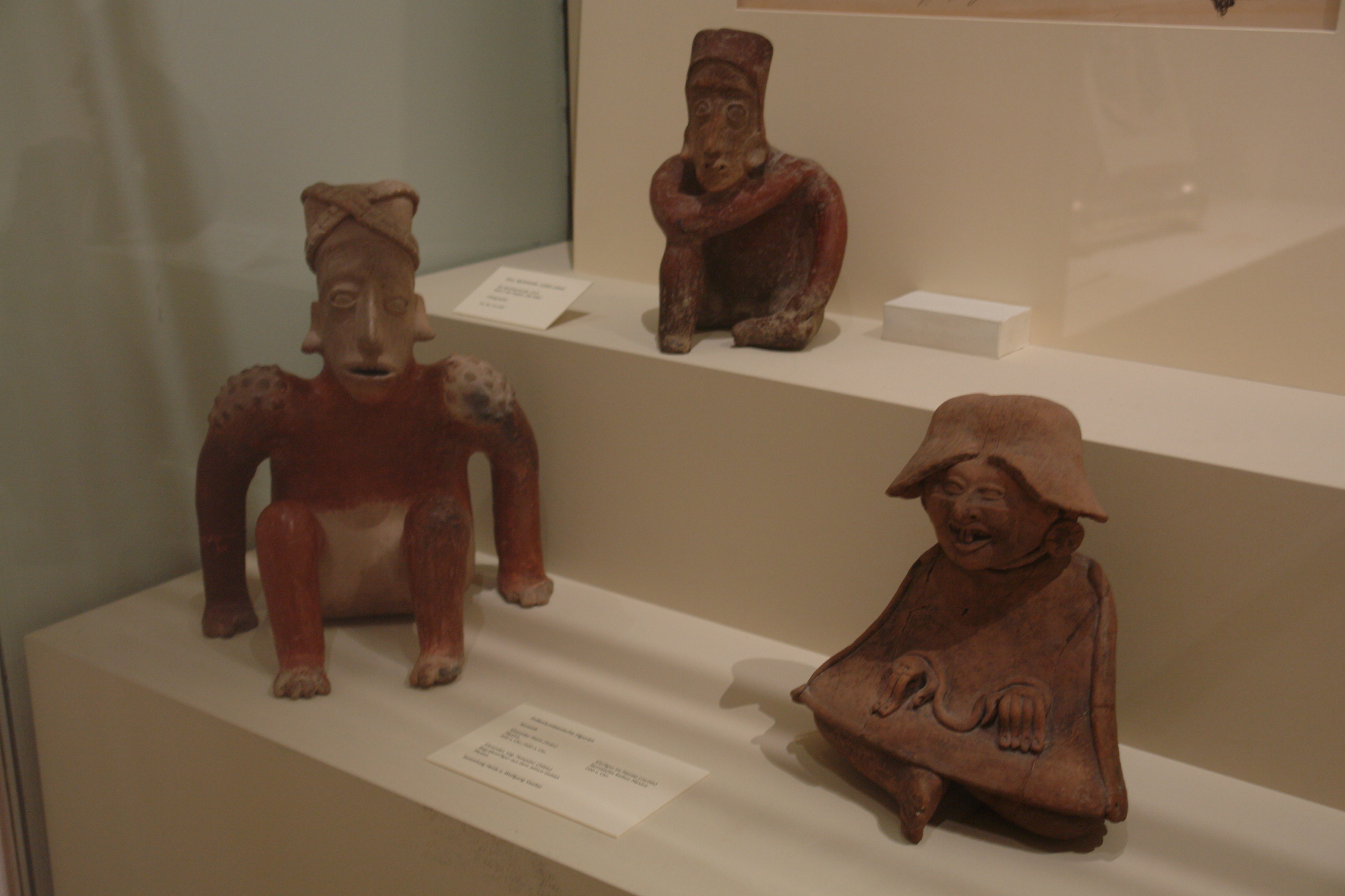 Präkolumbanische Figuren aus der Sammlung Heide u. Wolfgang Voelter, Tübingen. Links sitzender Mann, Mexiko 300vC-300nC. Mitte Pensador Begräbnisfigur aus dem Jalisco-Gebiet in Mexiko. Rechts Sitzfigur